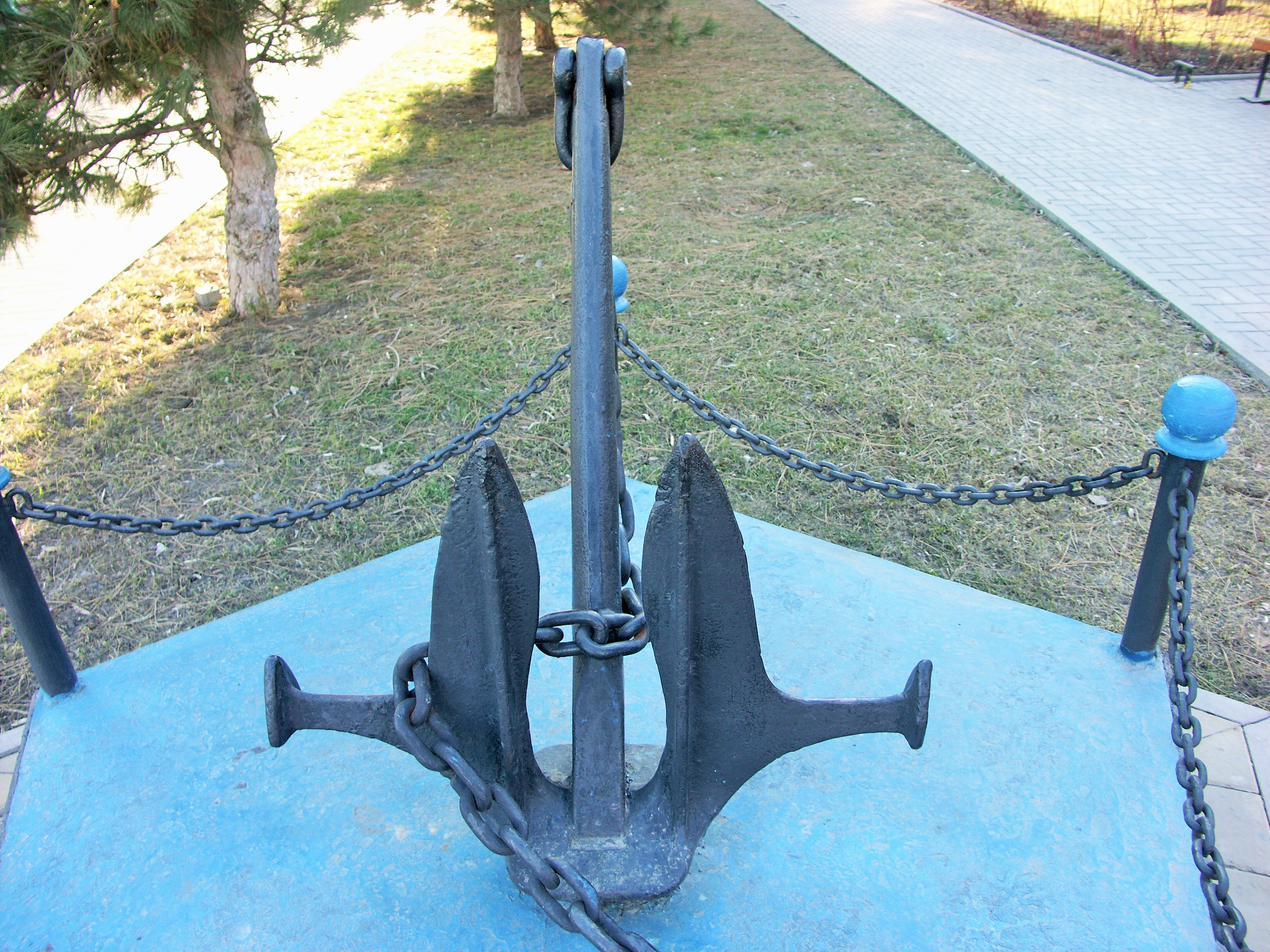 Якорь Матросова, установлен как памятный знак, Ростов-на-Дону улица Седова.